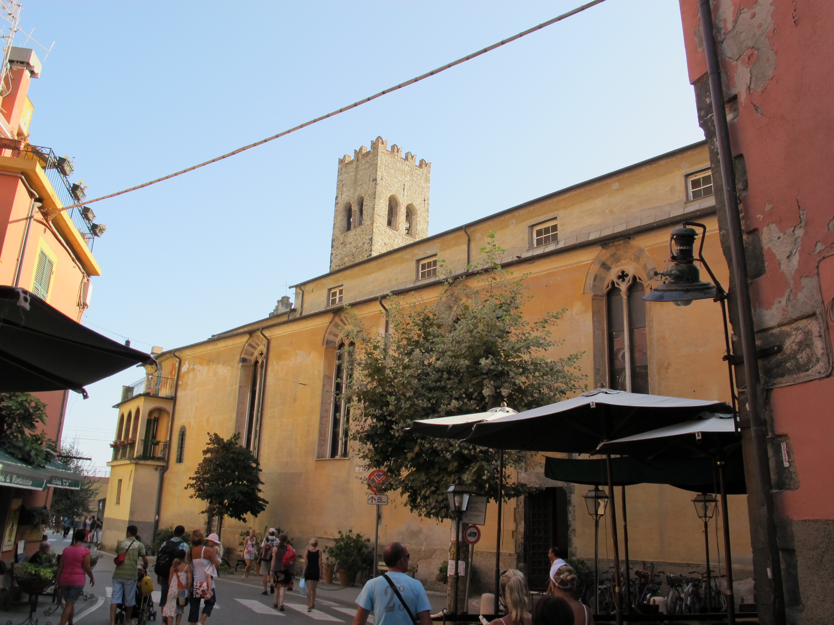 Monterosso, san giovanni battista